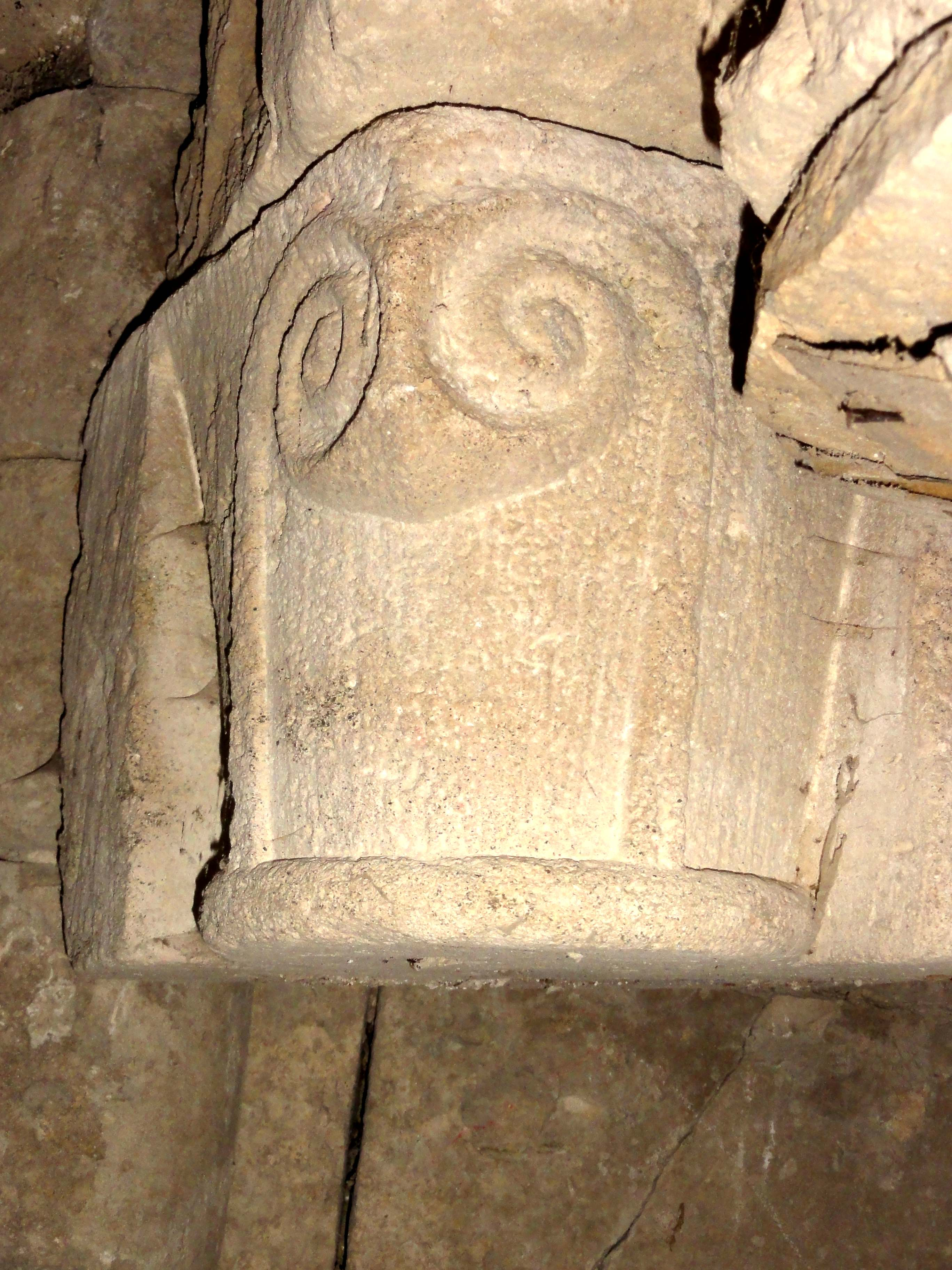 Chapiteau de l'église - voir titre.